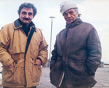 Roberto Alifano y Vargas LLosa